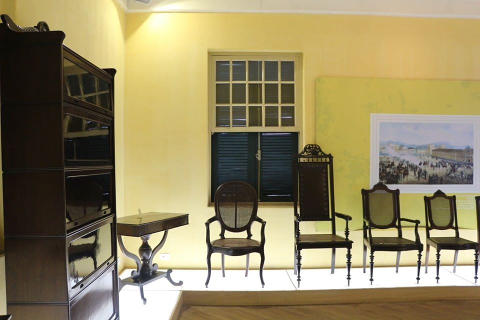 Uma das salas da exposição de longa duração do Museu Histórico e Pedagógico Conselheiro Rodrigues Alves, em Guaratinguetá-SP.